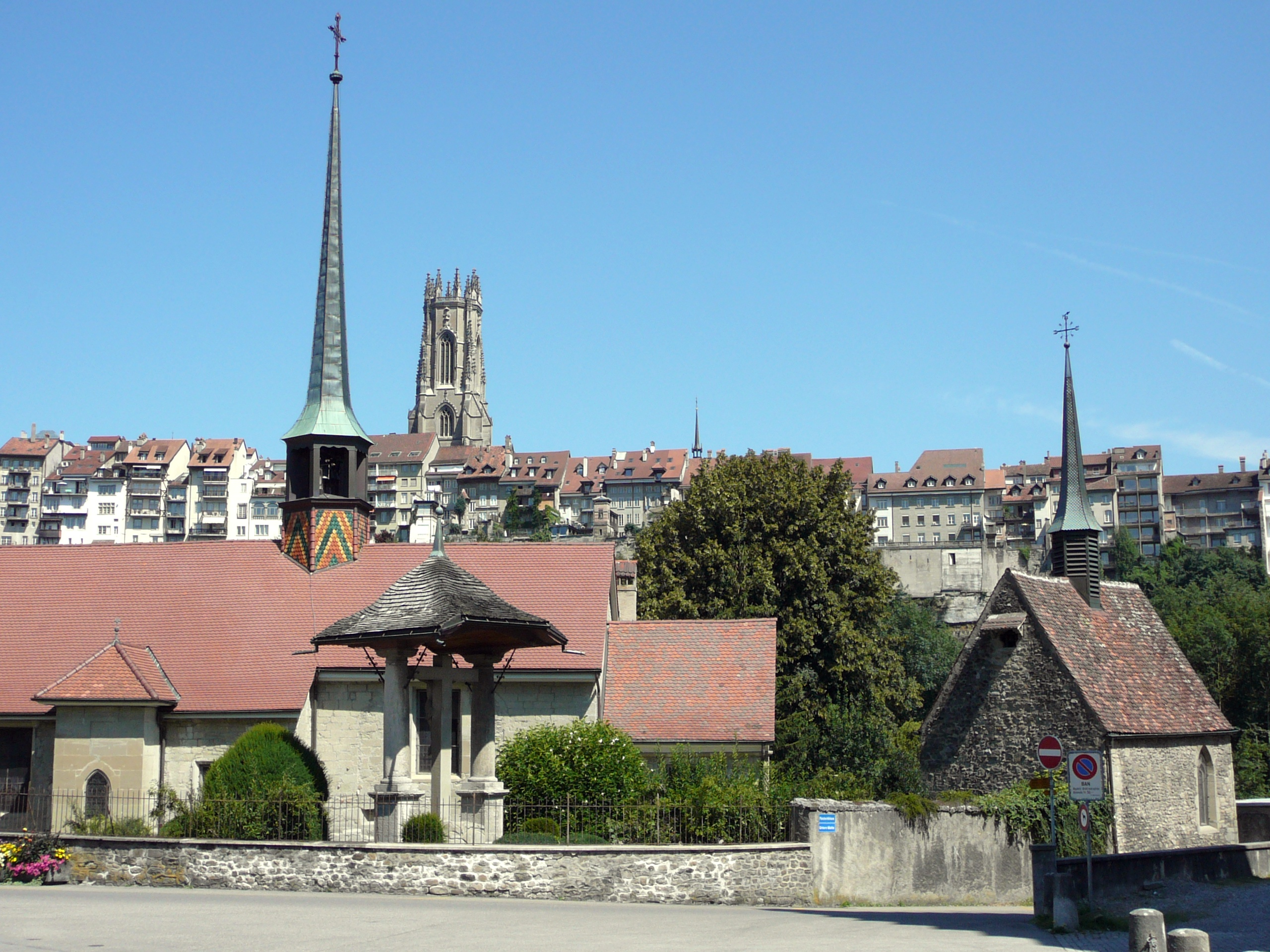 Commanderie St Jean